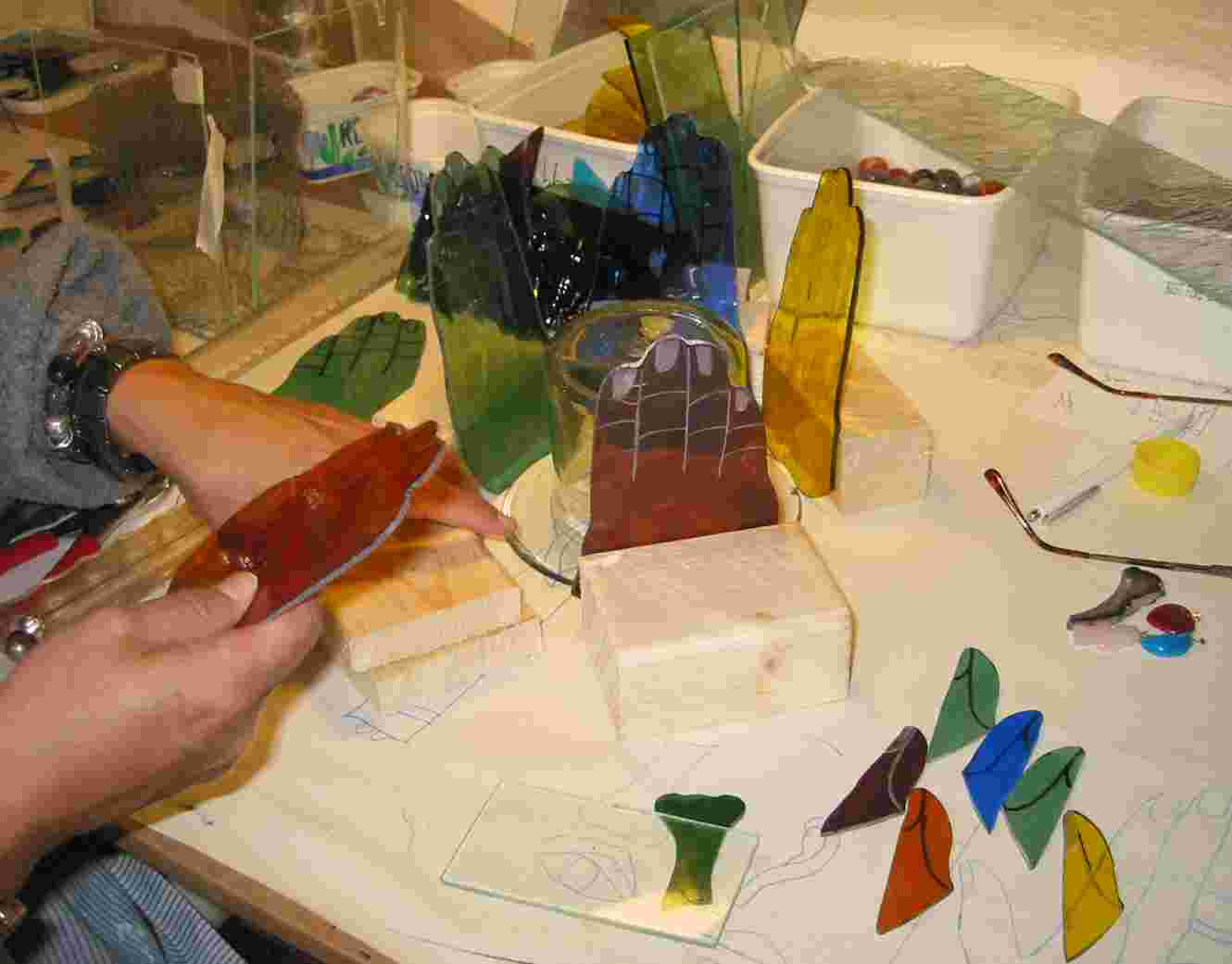 Tiffanyhantverk med färgat glas. Fotograf:Alex Flink